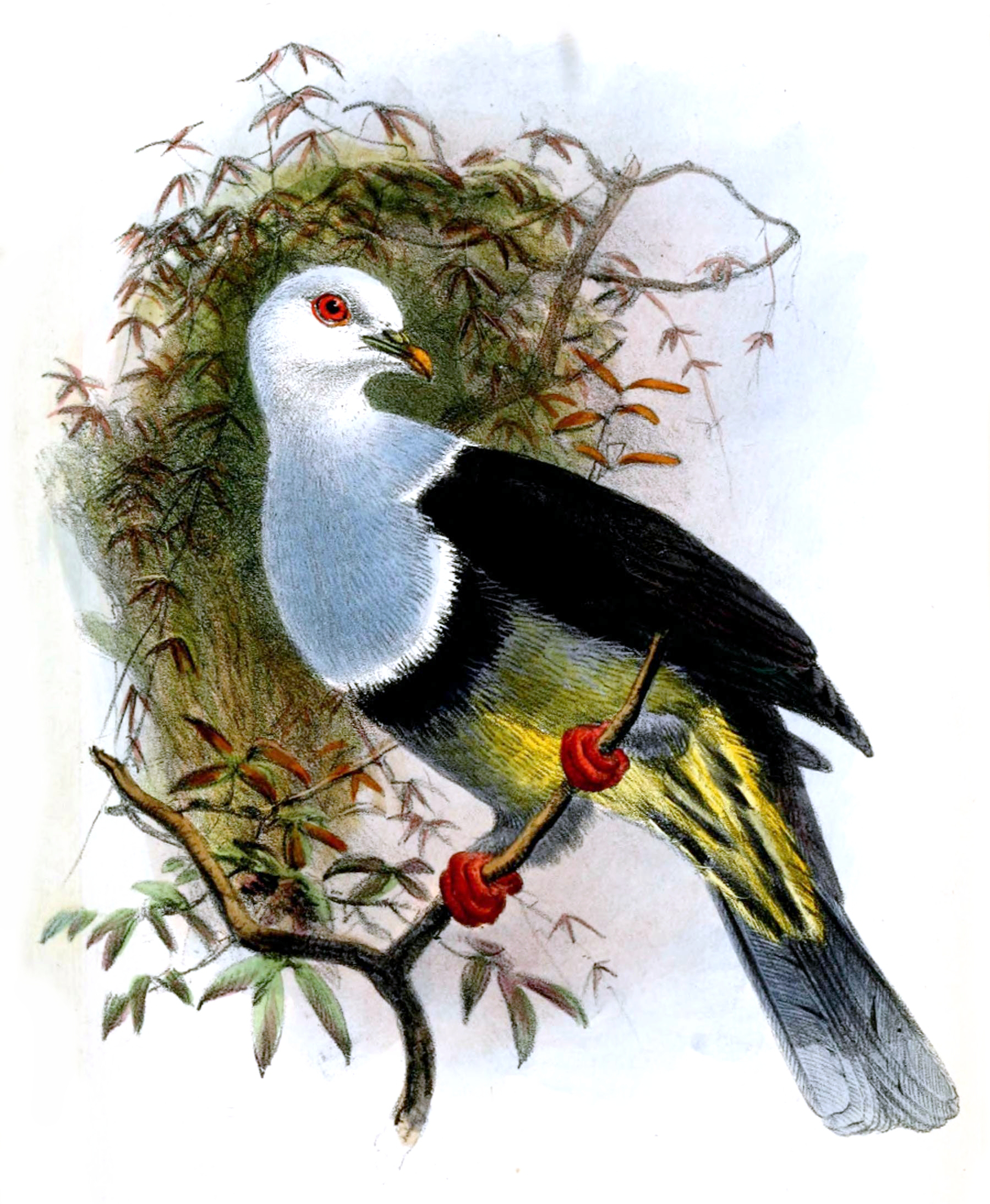 Ptilonopus albocinctus = Ptilinopus cinctus albocinctus